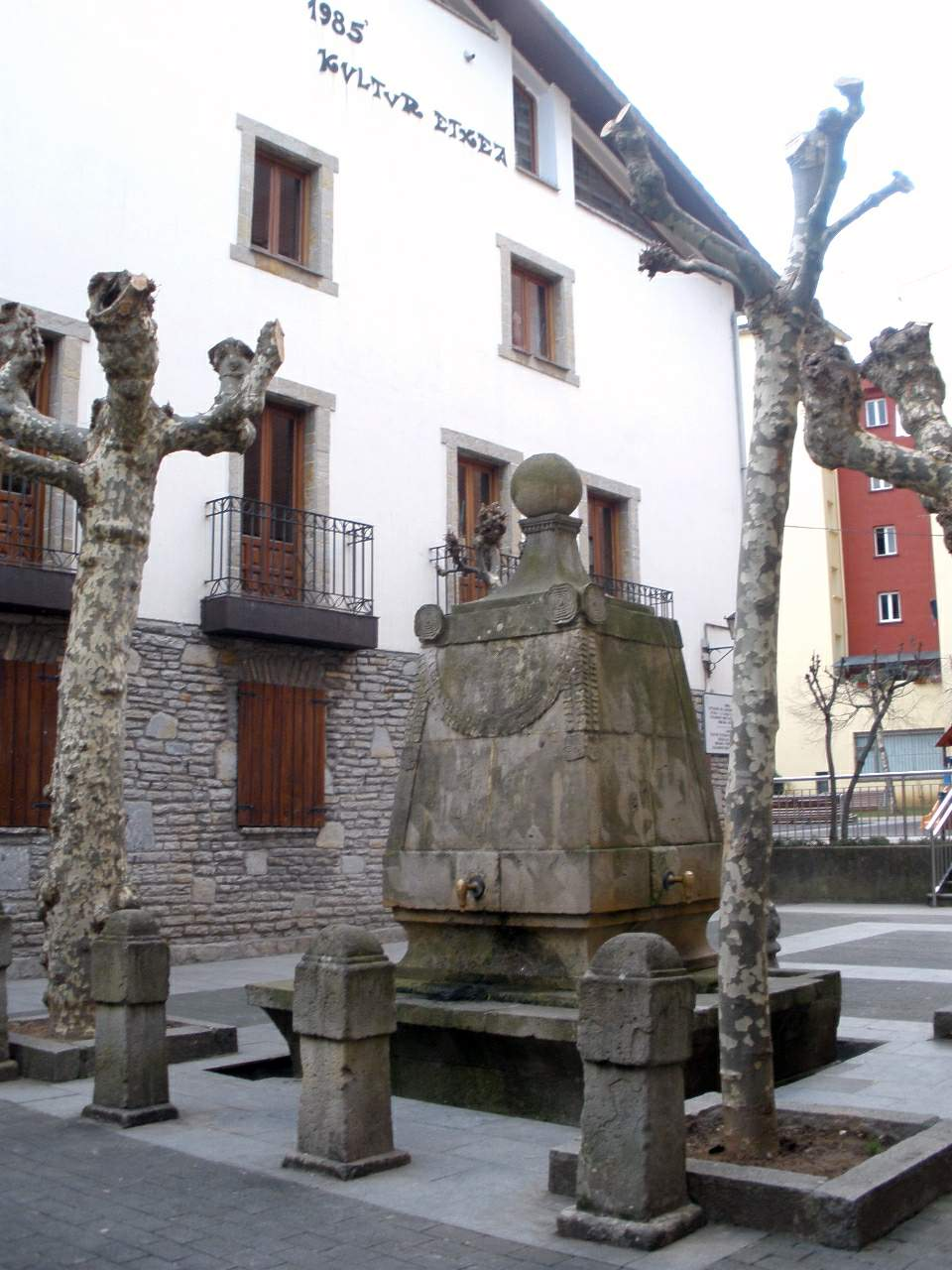 Fuente de los Tres Caños (Ugao-Miraballes, Bizkaia)